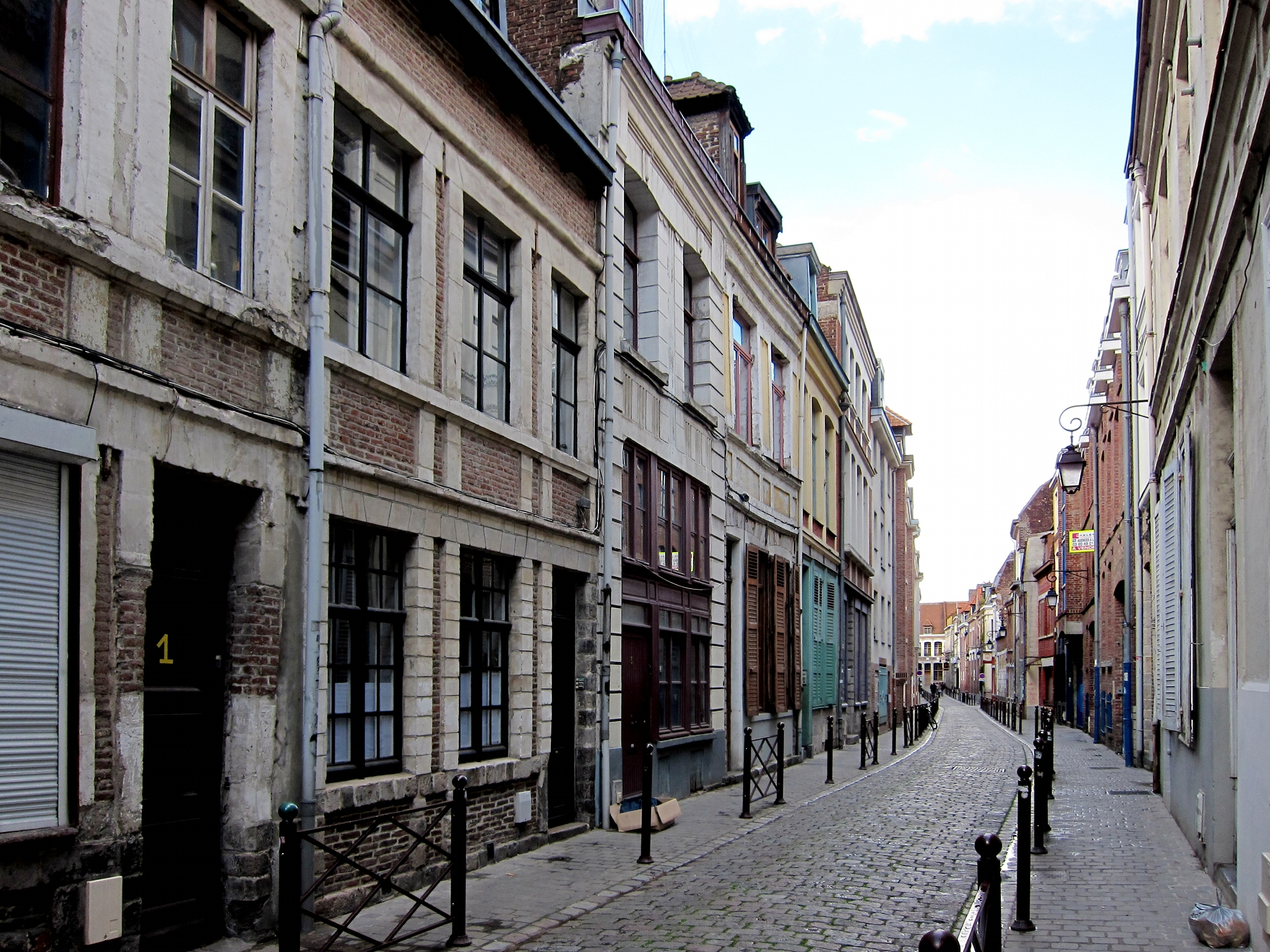 La rue Doudin dans le Vieux-Lille à Lille (Nord). Étymologie: Citée dans les Charles du XVe Siècle sous le nom de rue de Houdaing et du XVIIe Siècles sous le nom de Houdin.